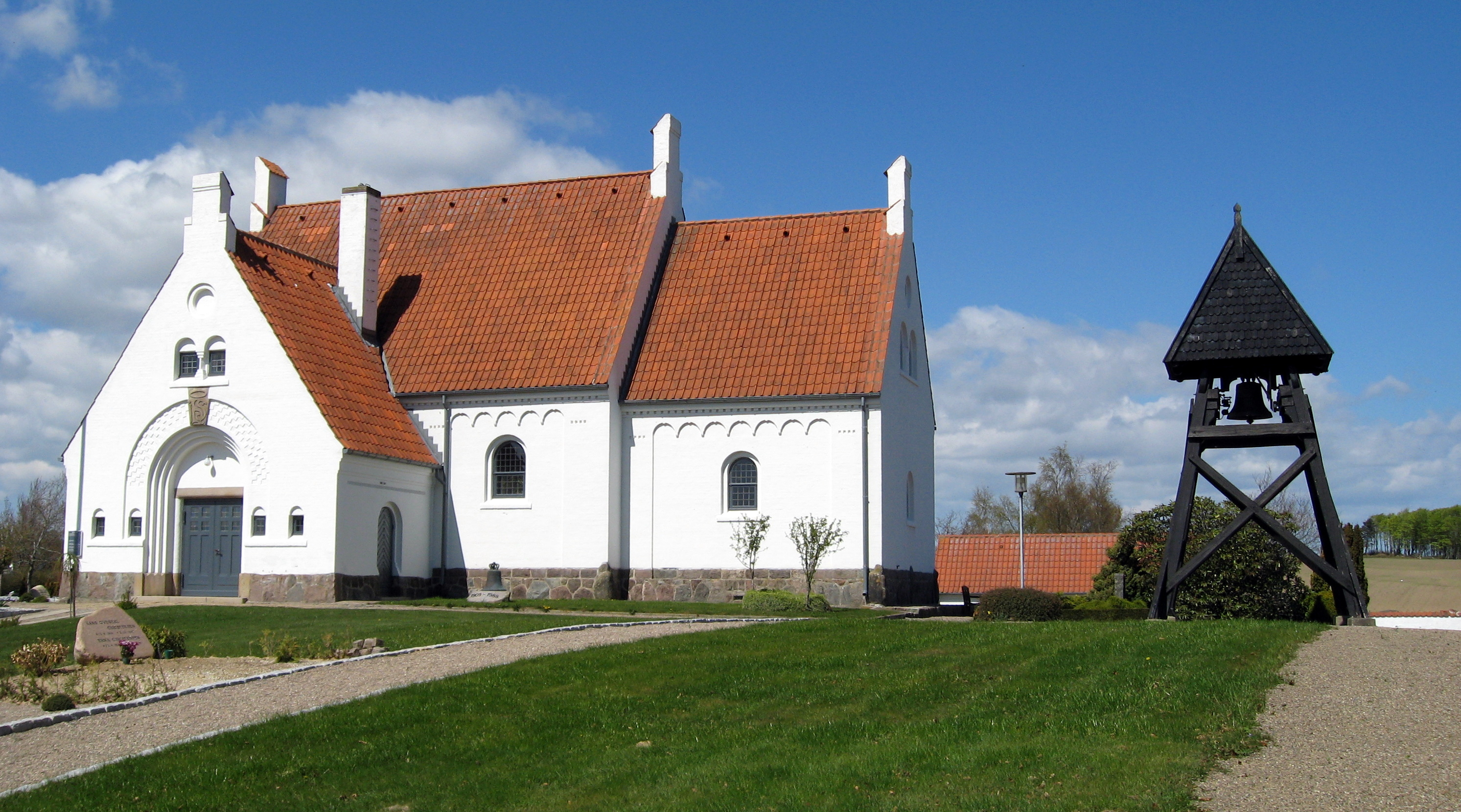 Morild Kirke, Tårs Sogn (Hjørring Kommune)